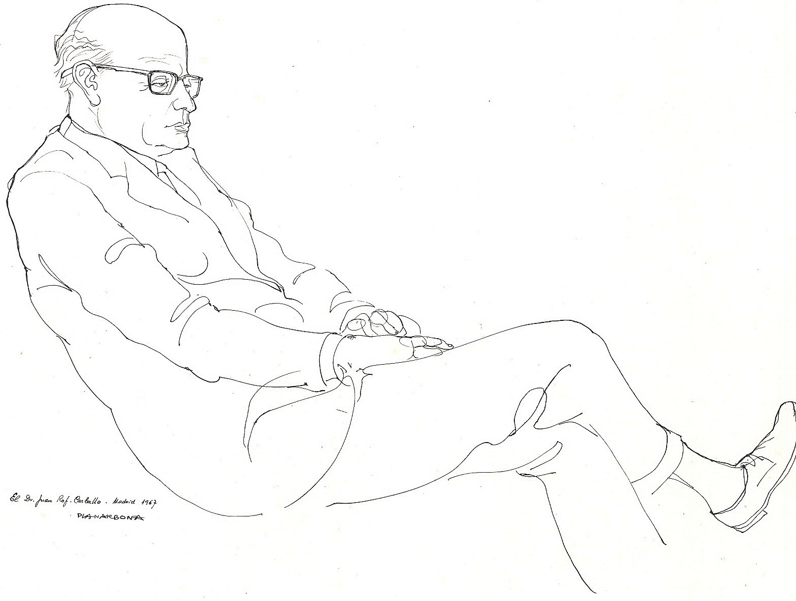 Retrat de Juan Rof Carballo per Josep Pla-Narbona